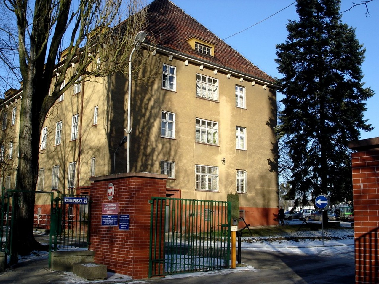 Szczecin, ul. Żołnierska 45 - dawny sztab brygady WOP w Szczecinie, obecnie Pomorski Oddział Straży Granicznej